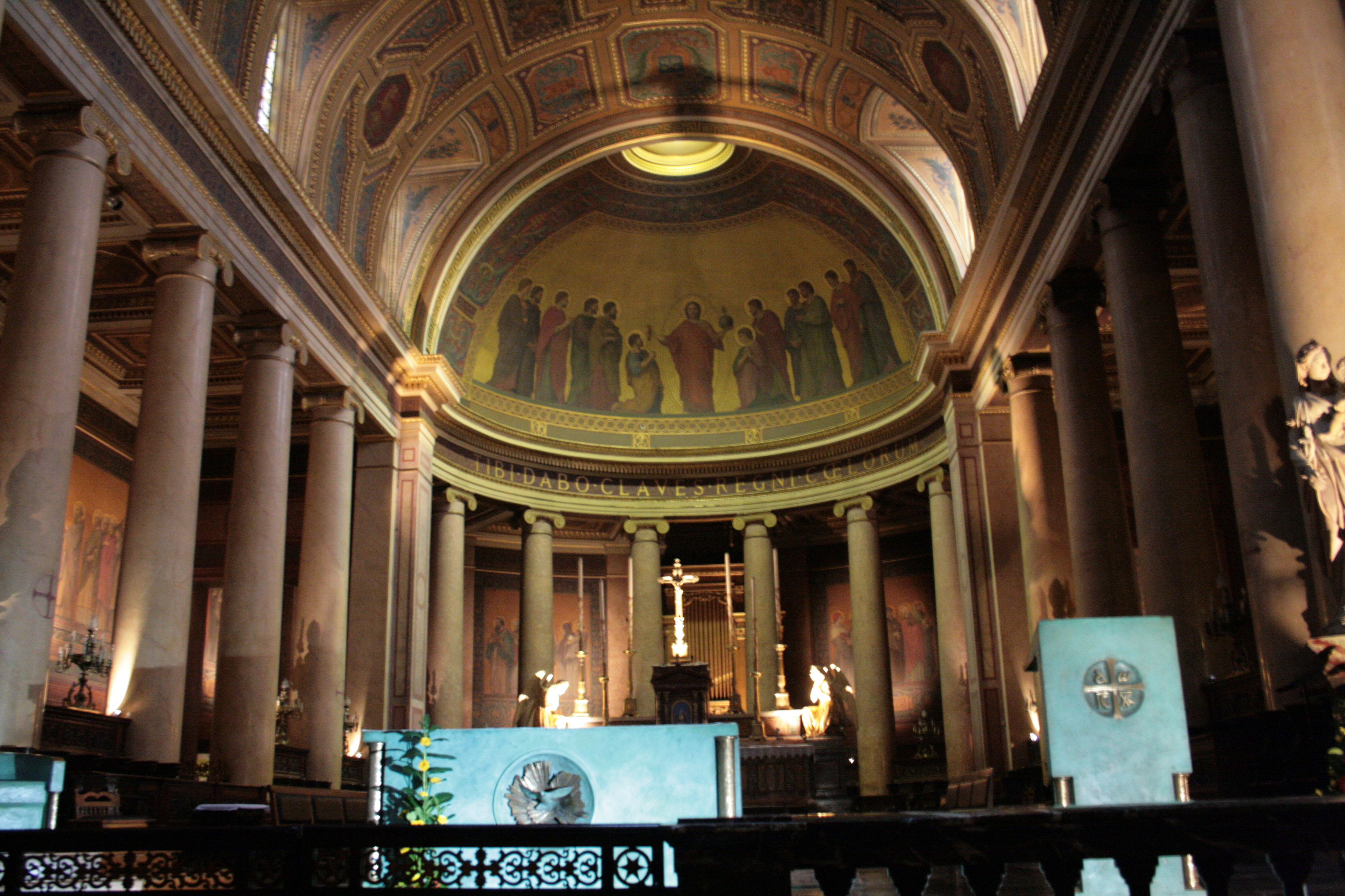 Choeur de la cathédrale Saint-Pierre de Rennes (XIXe siècle). Fresque de la conque de l'abside : la Remise des clés à Saint-Pierre, par Alphonse Le Hénaff (1871-1876). Au premier plan, mobilier contemporain du peintre Arcabas.